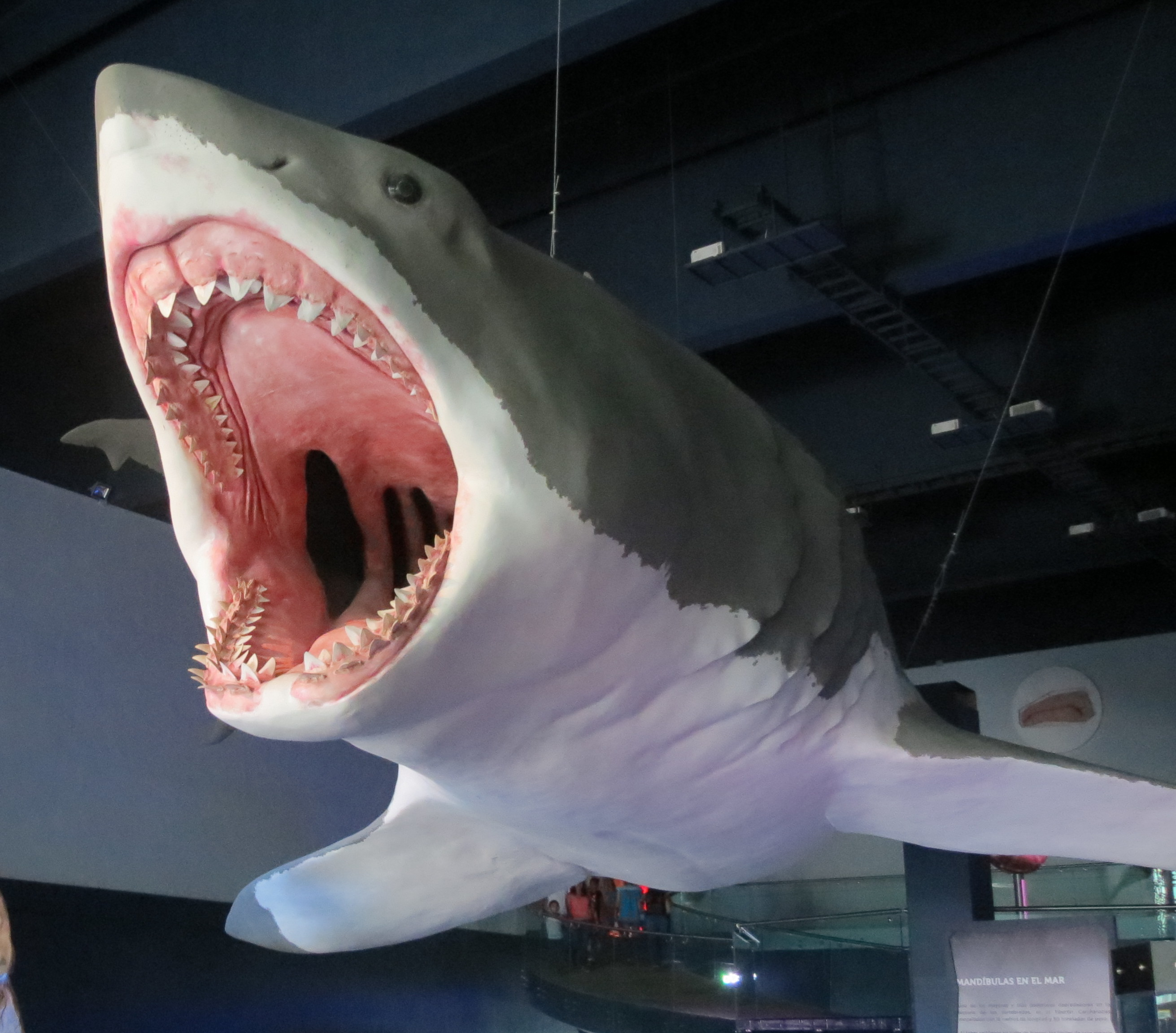 Reconstrucción de un Megalodon a escala real (16 metros de largo) y una dentadura en el Museo de la Evolución de Puebla